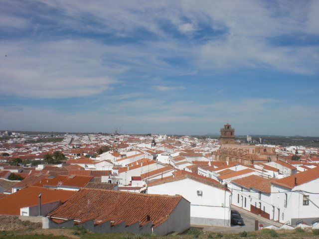 Azuaga el la kastelo